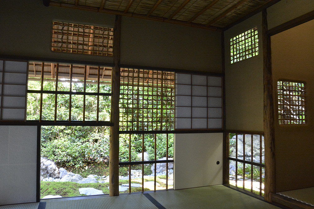 太閤山荘 擁翠亭（内部より望む）